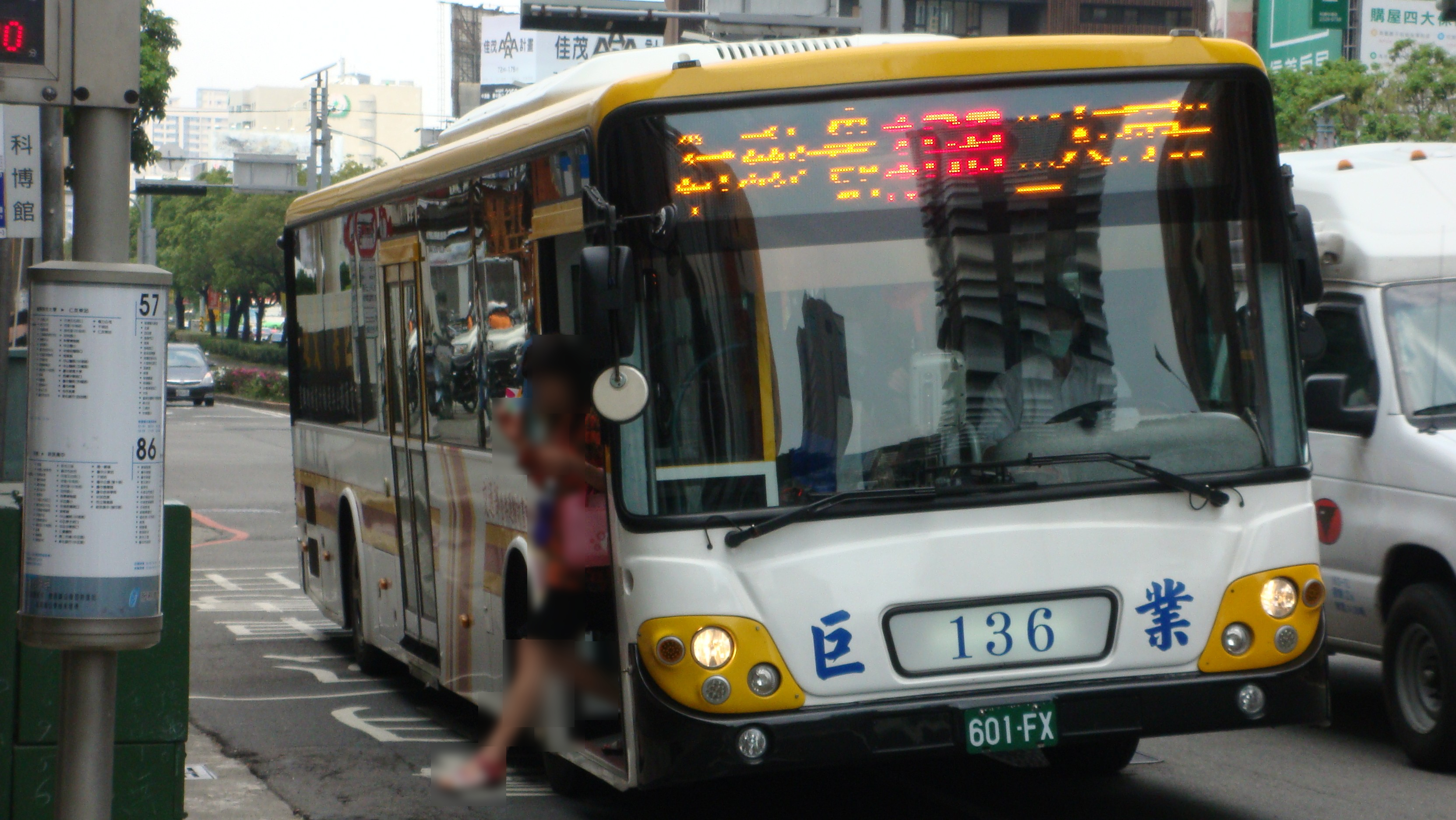 巨業交通大宇BS120CN大客車601-FX行駛台中市公車168路。